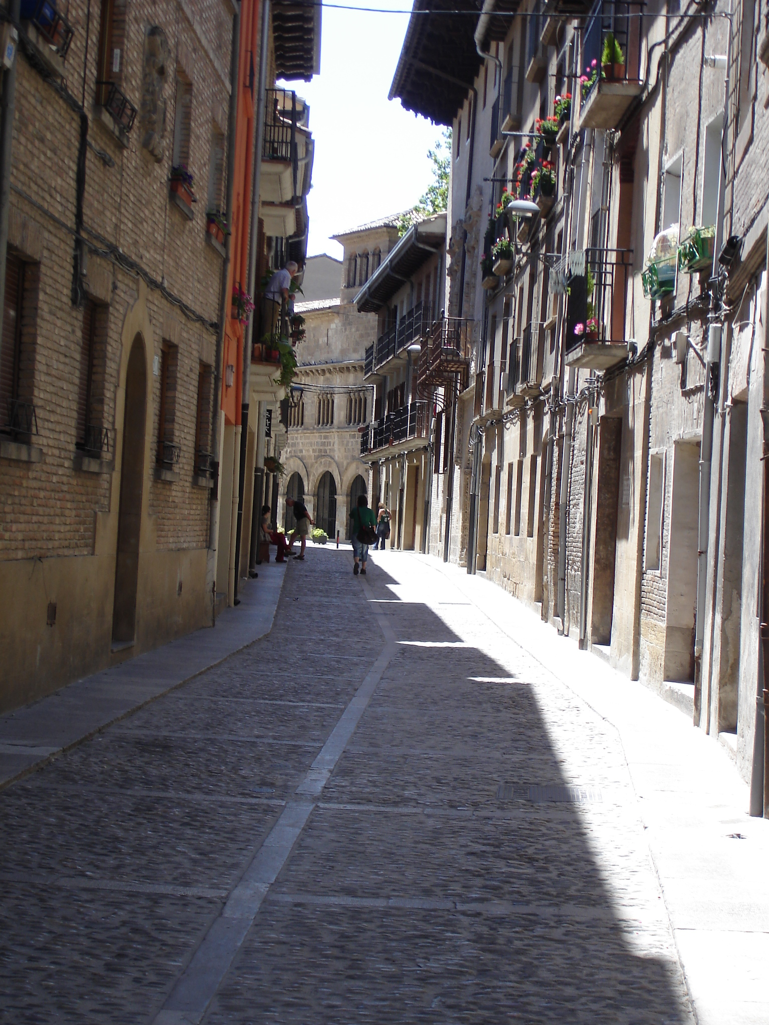 Estella